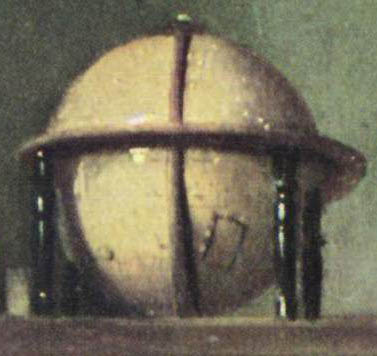 Sono l'autore. È eleborazione del file commons: Jan_Vermeer_van_Delft_009.jpg